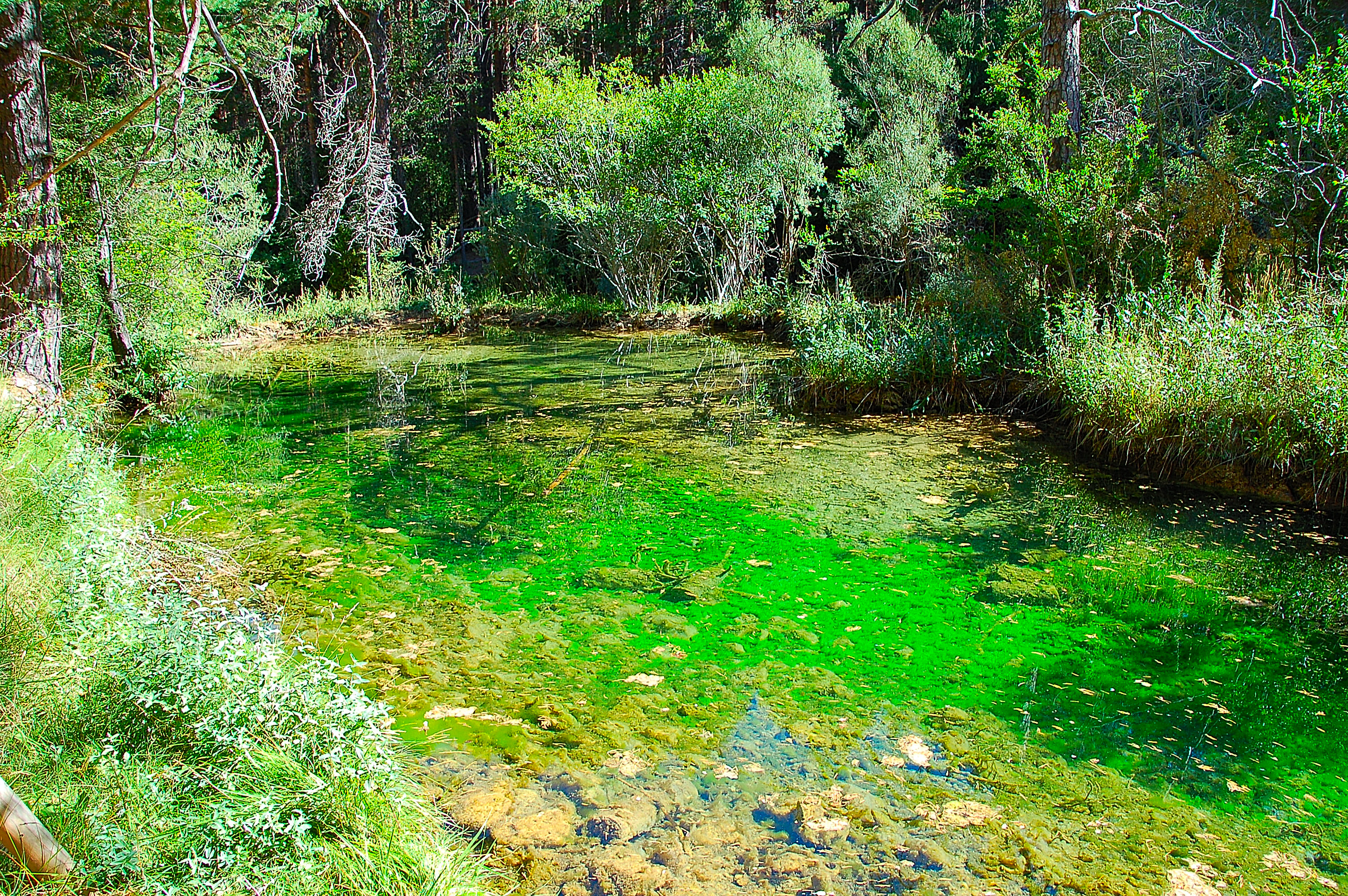 Serranía de Cuenca- Vista del nacimiento del Rio Cuervo This is a photography of a Site of Community Importance in Spain with the ID: ES4230014. Natura2000 entry, EEA entry